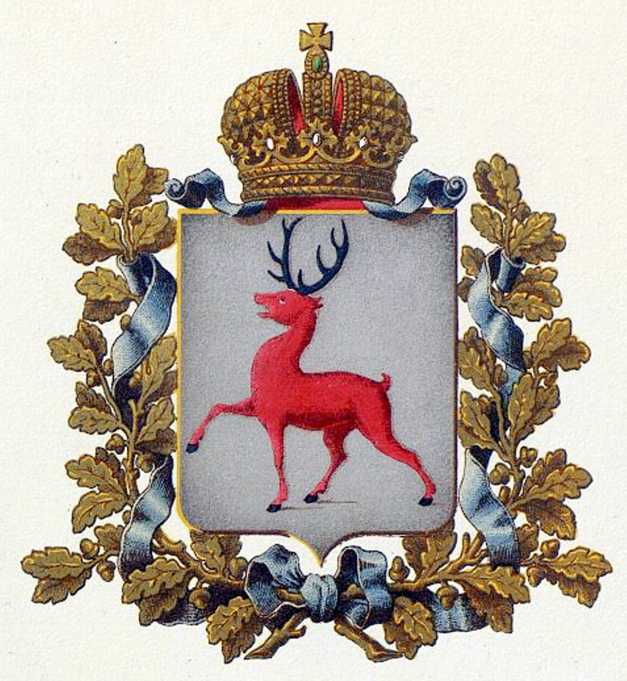 Official Russian Empire coat of arms Nizhny Novgorog Governorate. Герб Российской Империи Нижегородской губернии в Гербовнике МВД. Утверждён Императором Всероссийским Александром Вторым в 1878 году.